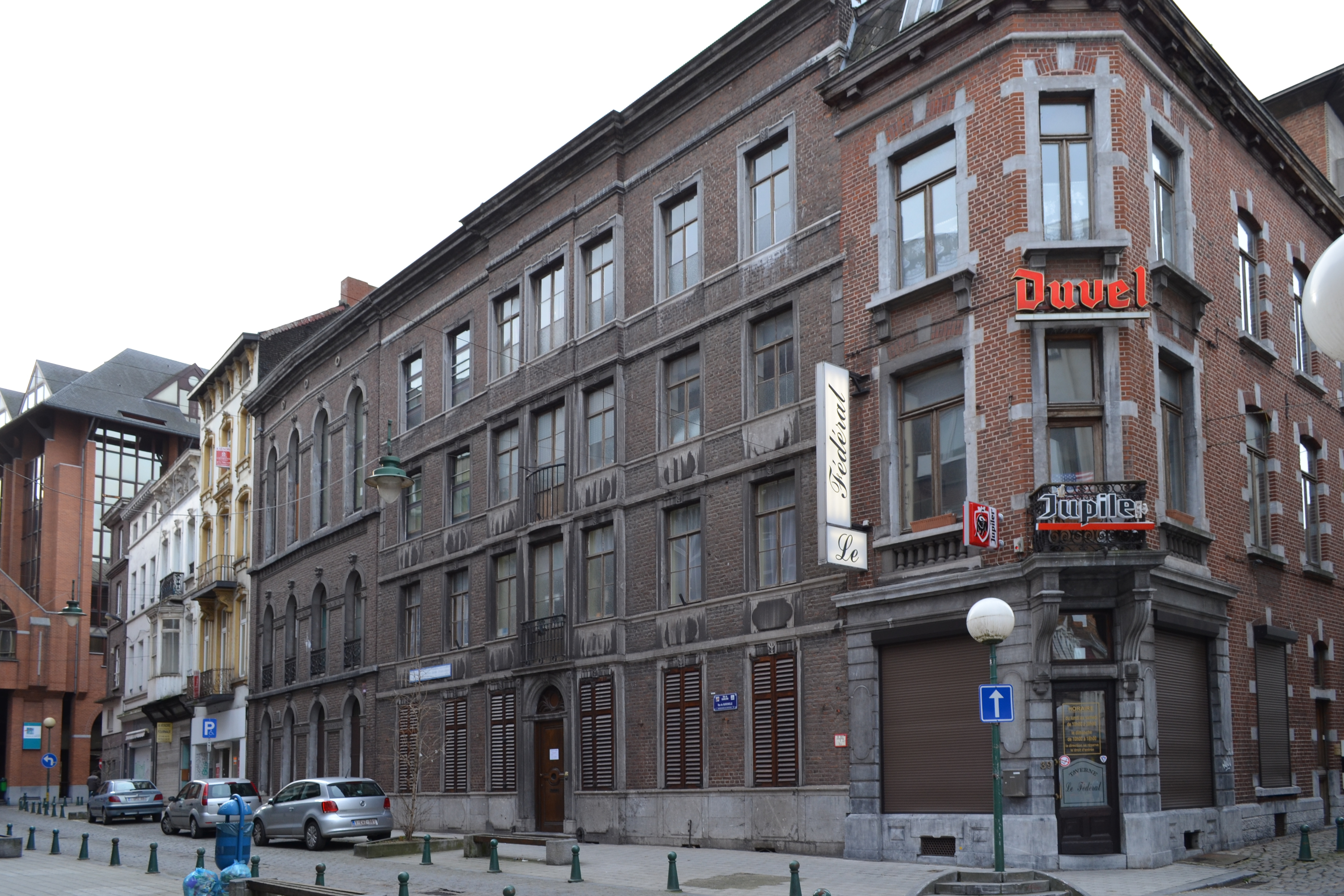 Charleroi (Belgique) - Institut Notre-Dame - façade principale à la rue de Marcinelle 41. Immeuble datant du XVIIIe siècle rehaussé d'un étage vers 1865.